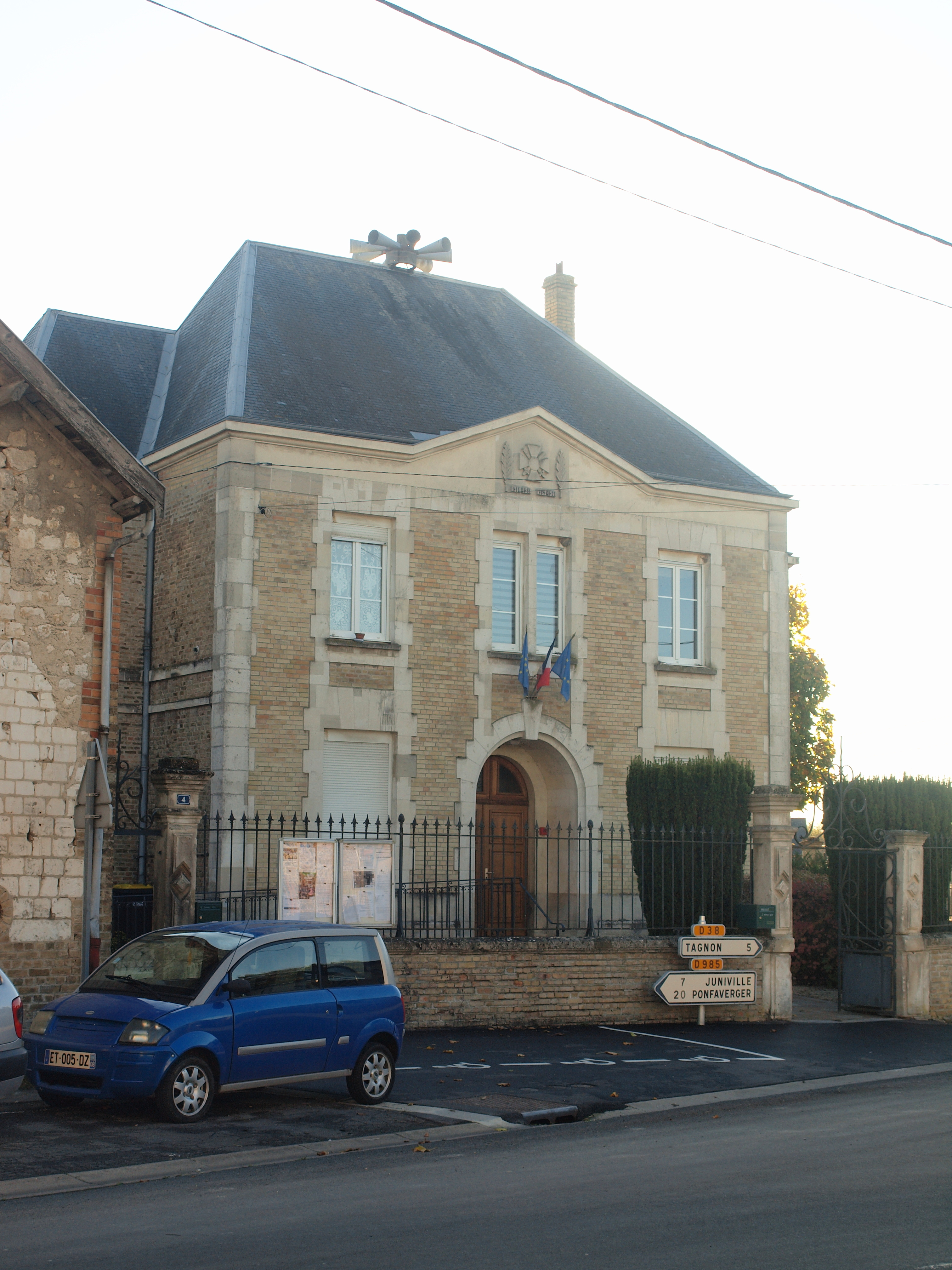 Mairie de Perthes (Ardennes, France)